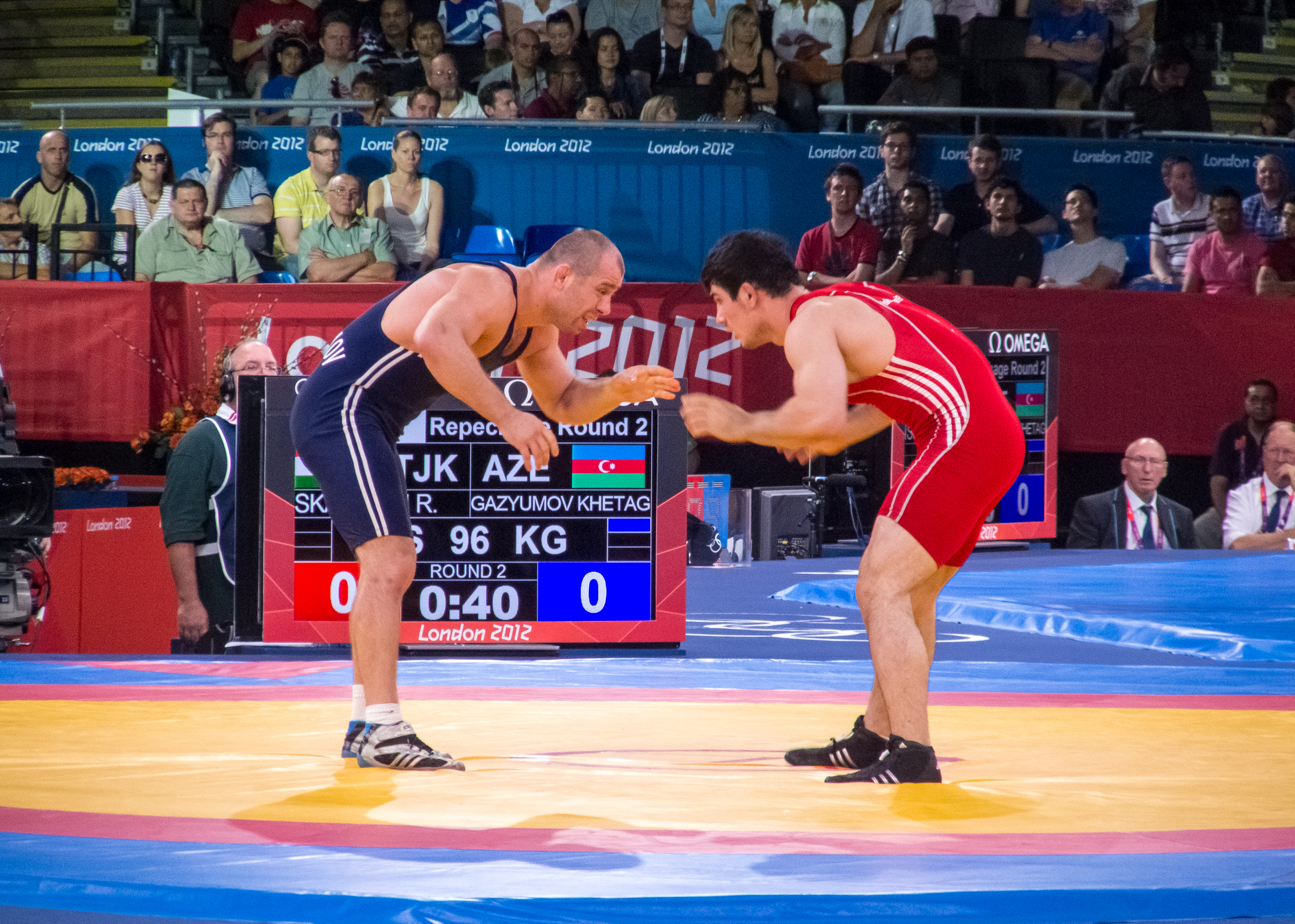 Khetag Gazyumov (blue, left) vs. Rustam Iskandari (red, right)